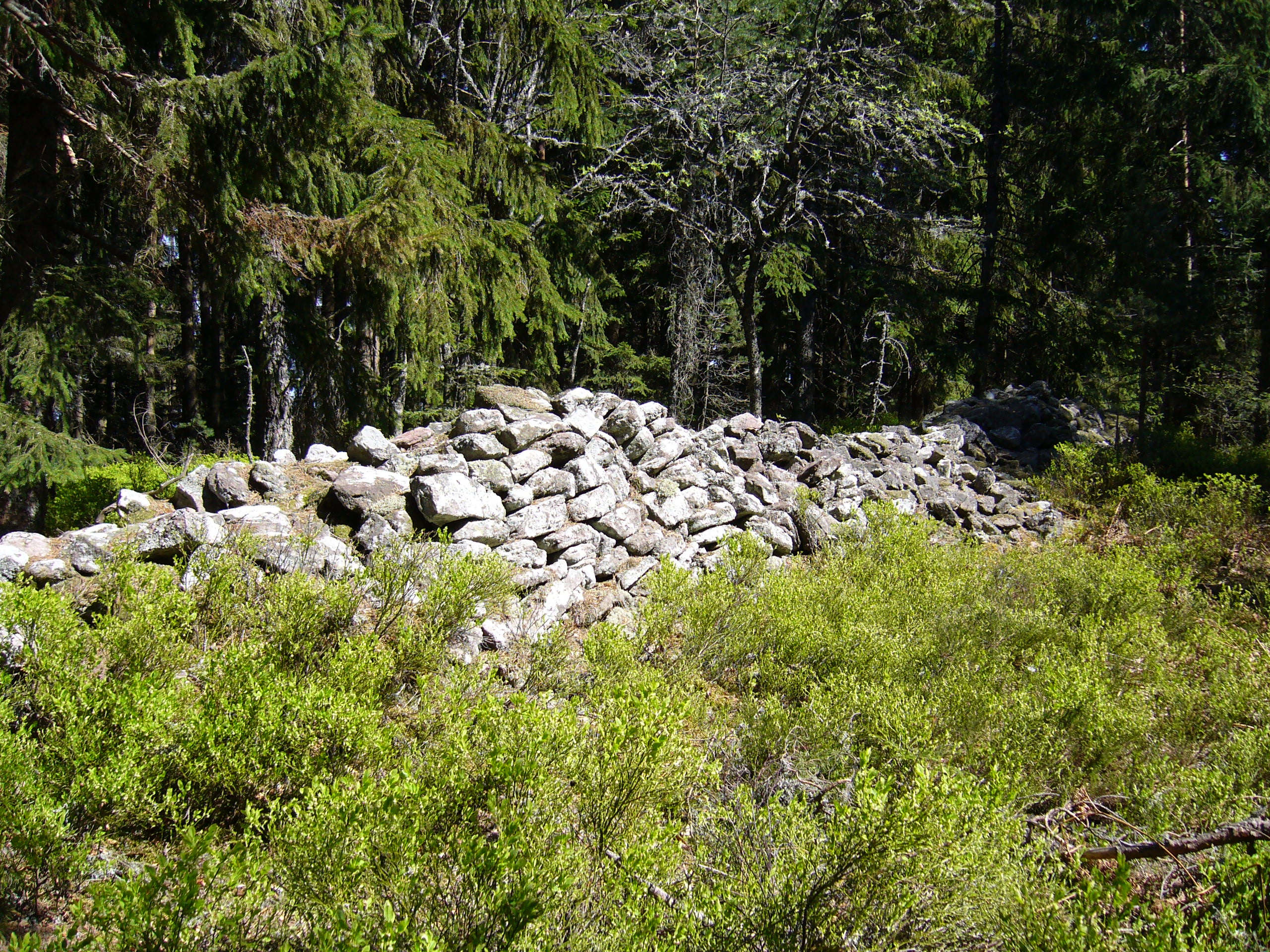 Taennchel 498.JPG